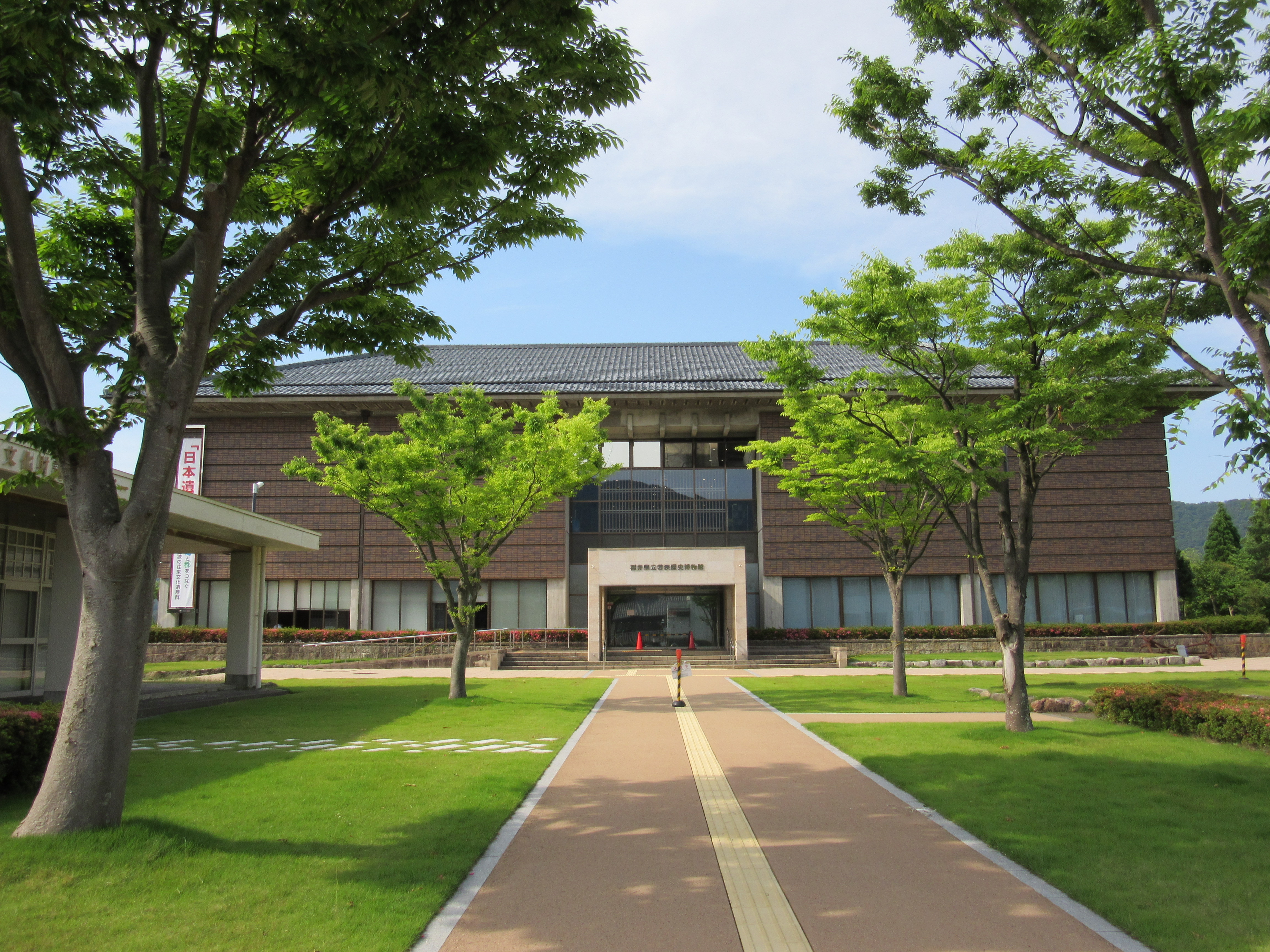 福井県立若狭歴史博物館